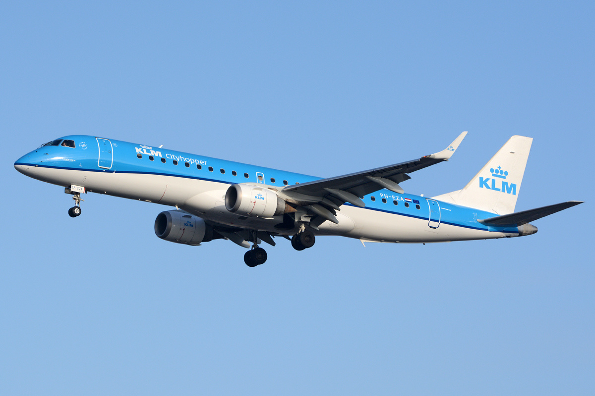 PH-EZA / EZA-224 (cn 19000224) The first visit to Heathrow by a KLM Embraer in the mildy revised livery, on New Year's Eve